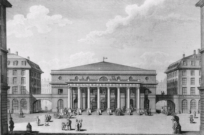 Théâtre de l'Odéon à l'époque Révolutionaire